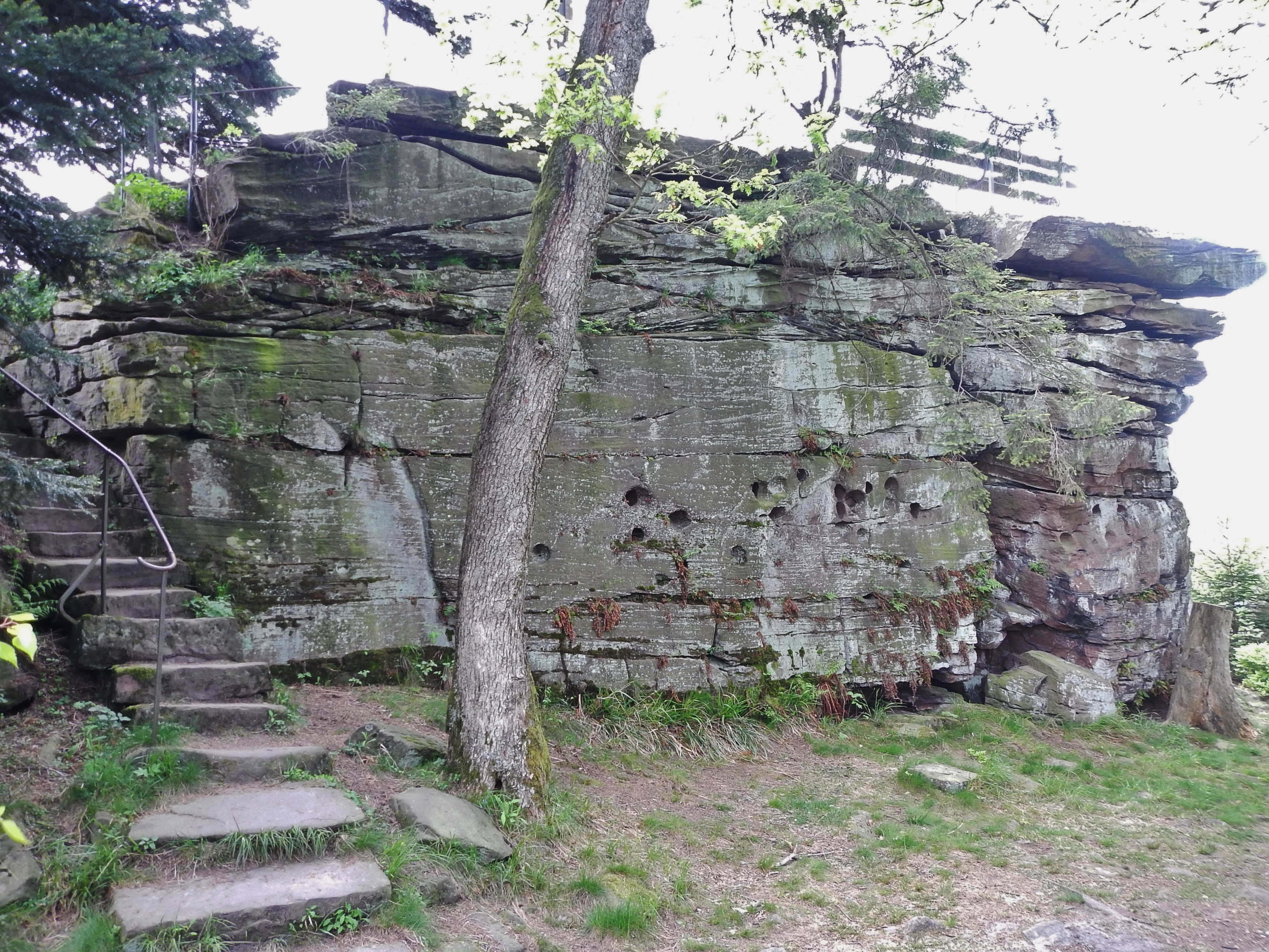 Bernsteinfels: Die Geschichte des Bernsteinfelses reicht bis ins frühe Erdmittelalter zurück. Vor etwa 240 Miilionen Jahren entstand im heutigen Süddeutschland eine bis zu 300 Meter dicke Buntsandsteinschicht. Vor 50 Millionen Jahren begann die Erdoberfläche zwischen dem heutigen Schwarzwalt und den Vogesen sich abzusenken.